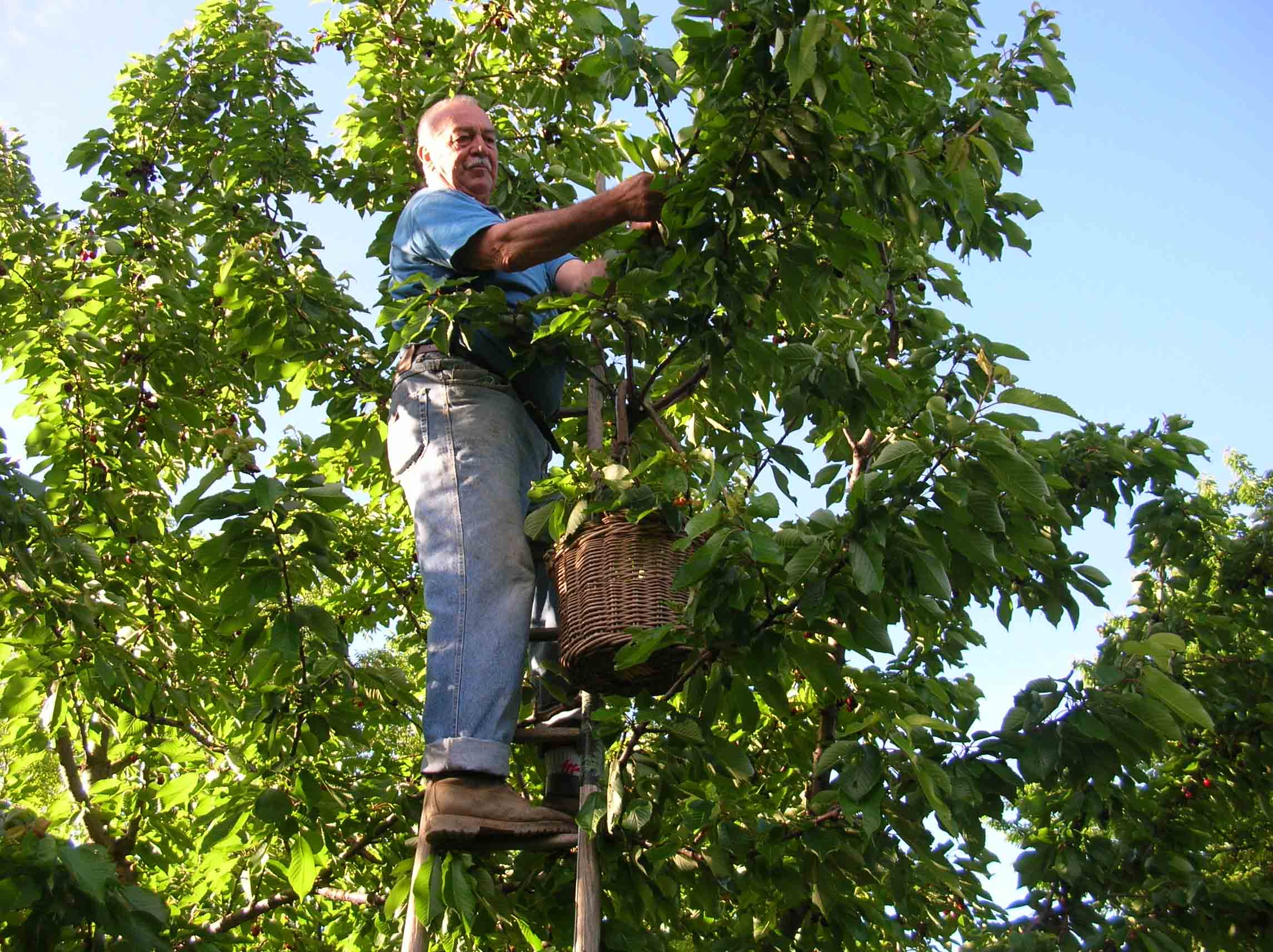 Il "Cujeur du Vilà"